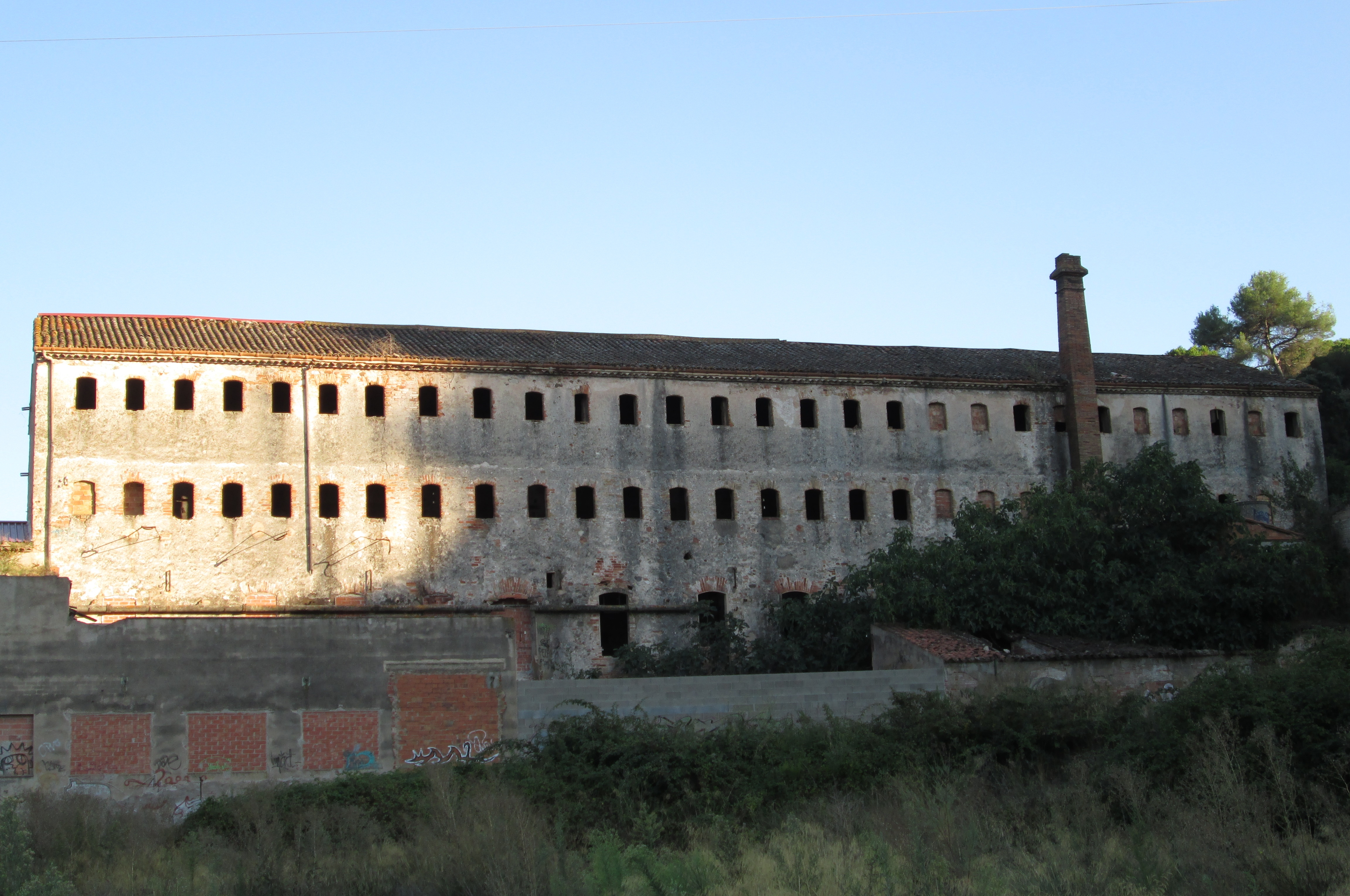 Molino Mornau, construido en el siglo XVI, está situado junto al río Ripoll cerca del puente de la carretera de Sabadell a Castellar, en el sector noreste y en las afueras de la ciudad de Sabadell, Barcelona (España).